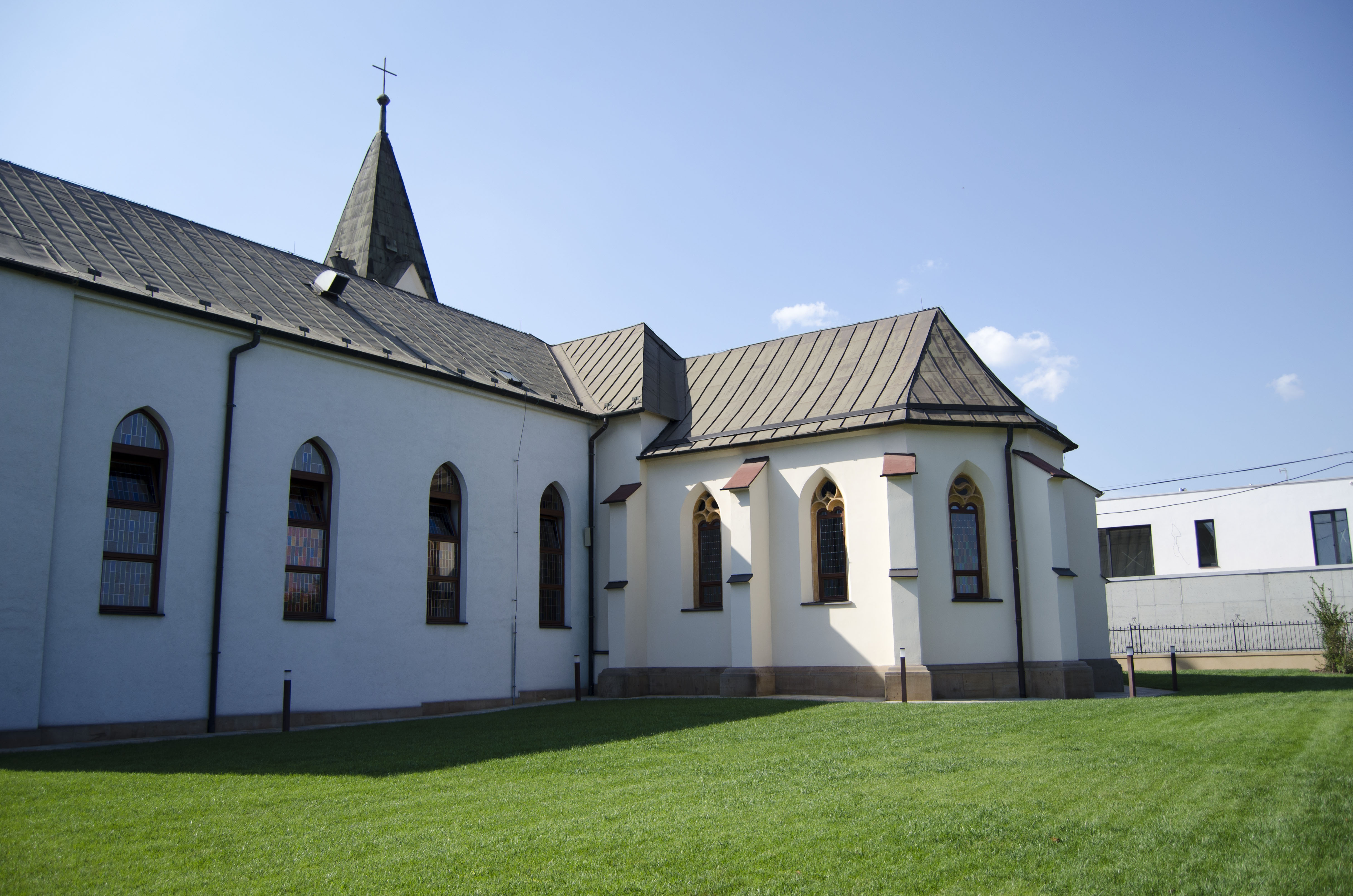 Barca 11